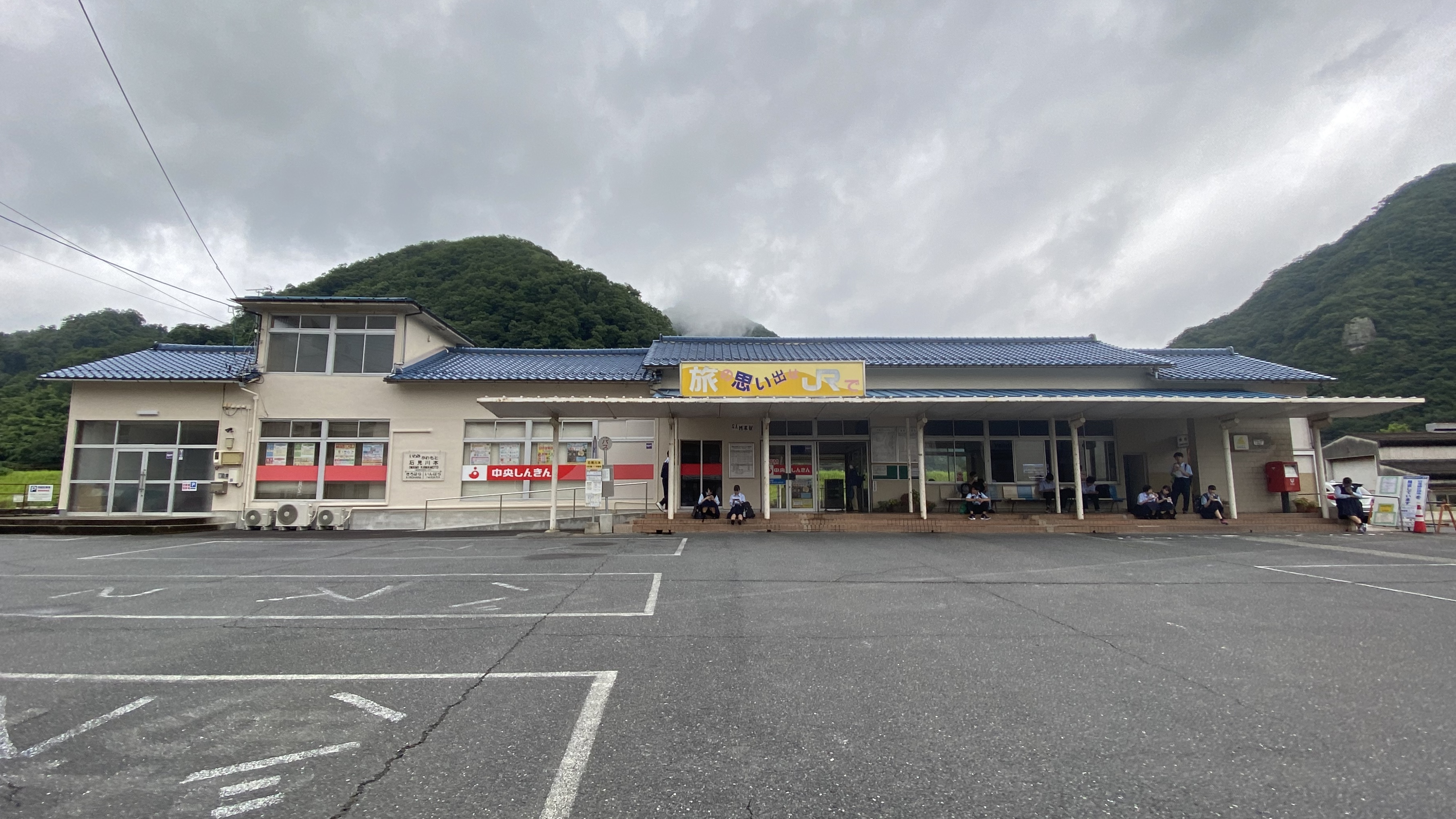 JR西日本三江線石見川本駅舎(廃駅後)